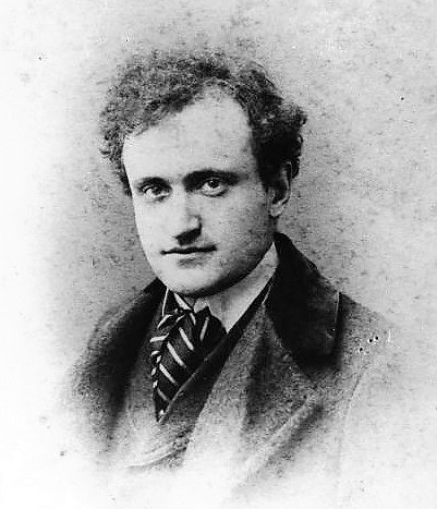 Federigo Tozzi